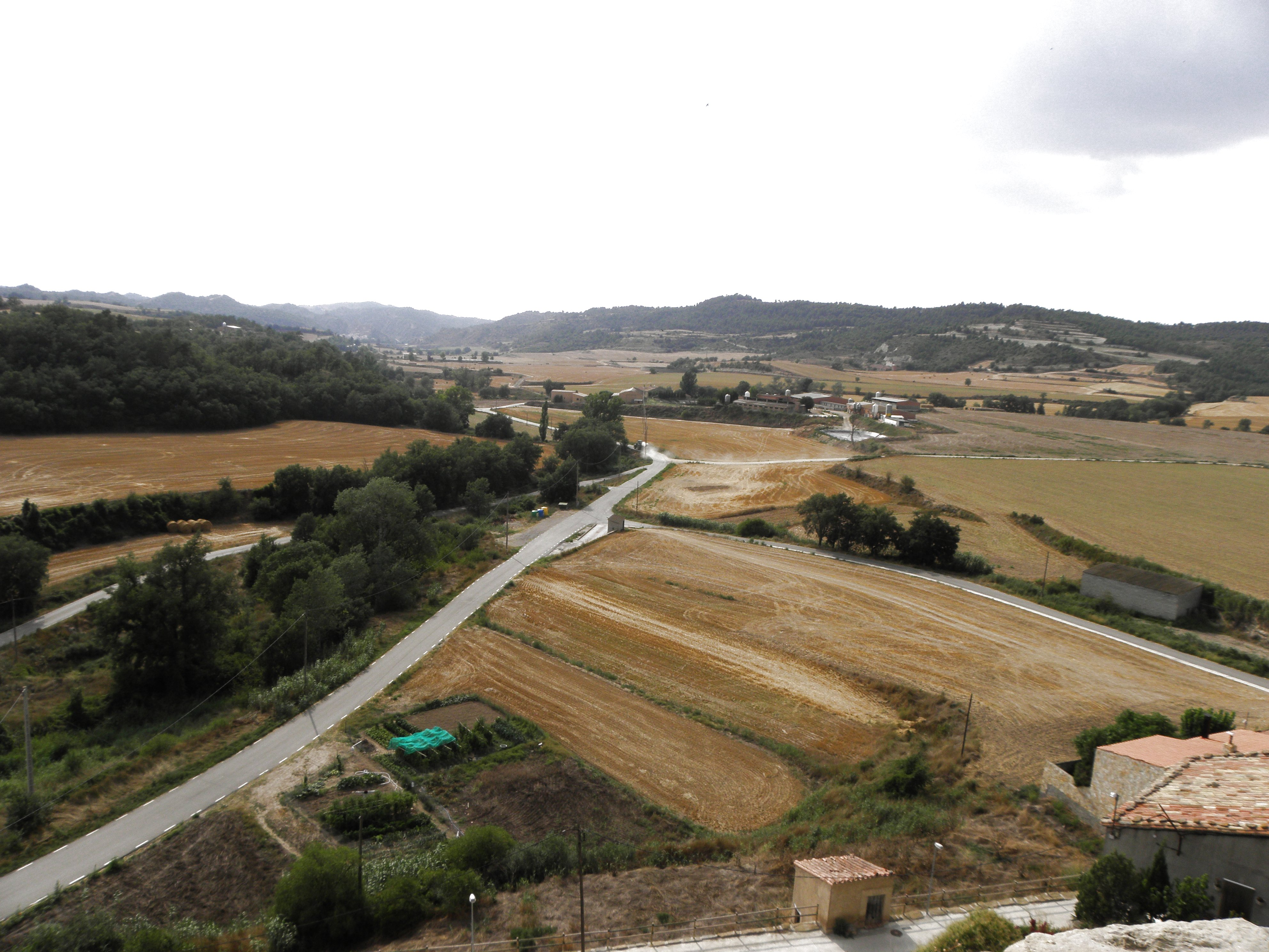 Vista del pla d'Enfesta des del castell (municipi de la Molsosa, Solsonès).